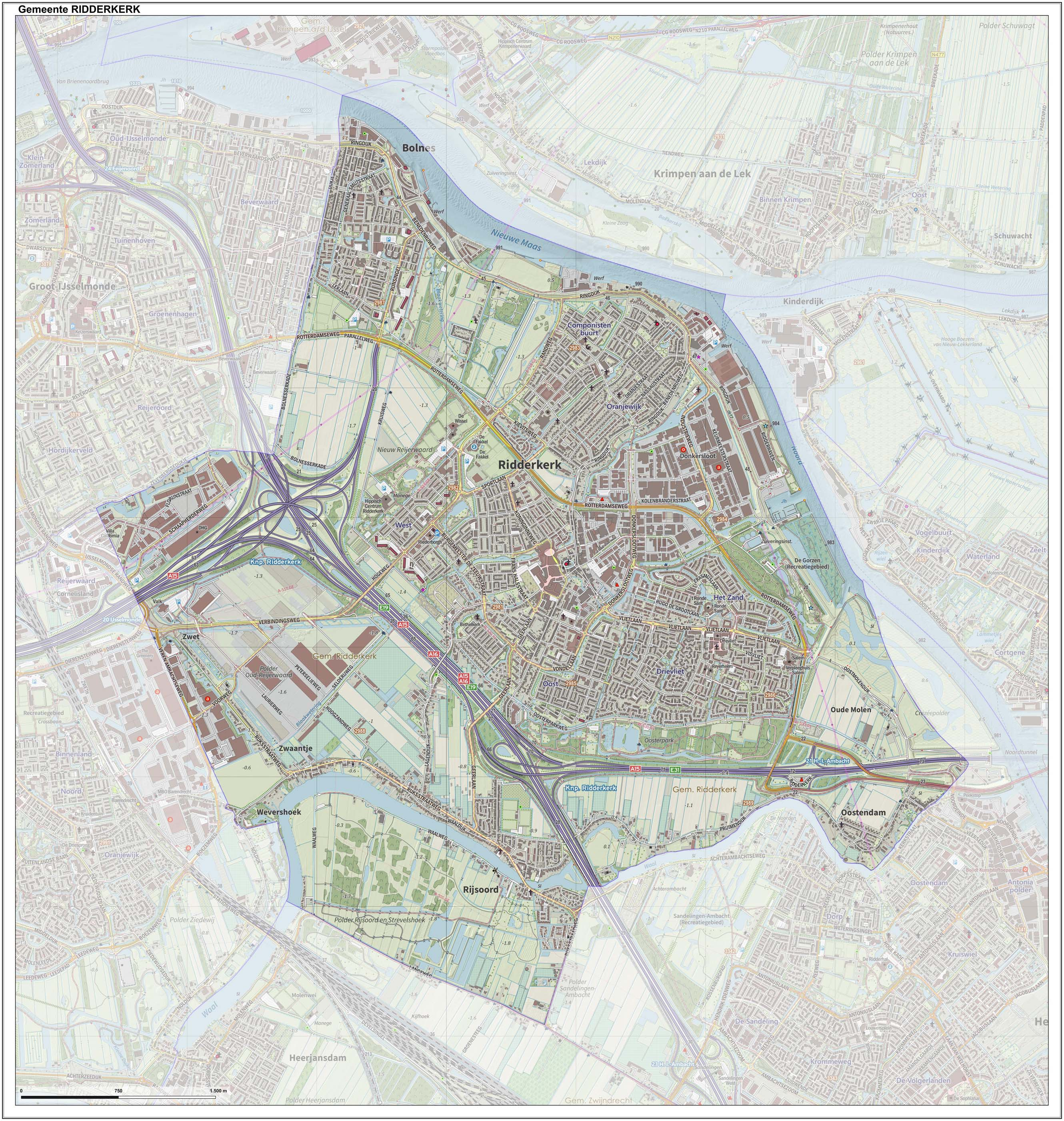 Topografische gemeentekaart. Resolutie: 400 pixels/km. Kaartbeeld samengesteld uit de open geodata van de Top10NL en Top25namen (Kadaster), Creative Commons-BY licentie. Gebouwvlakken uit open geodata BAG extract. Wegen uit de OpenStreetMap, OpenStreetMap community. Reliëfschaduw uit de Actuele Hoogtekaart AHN2. Samenstelling en kleurenschema: Jan-Willem van Aalst, met QGIS. Zie ook de Legenda.